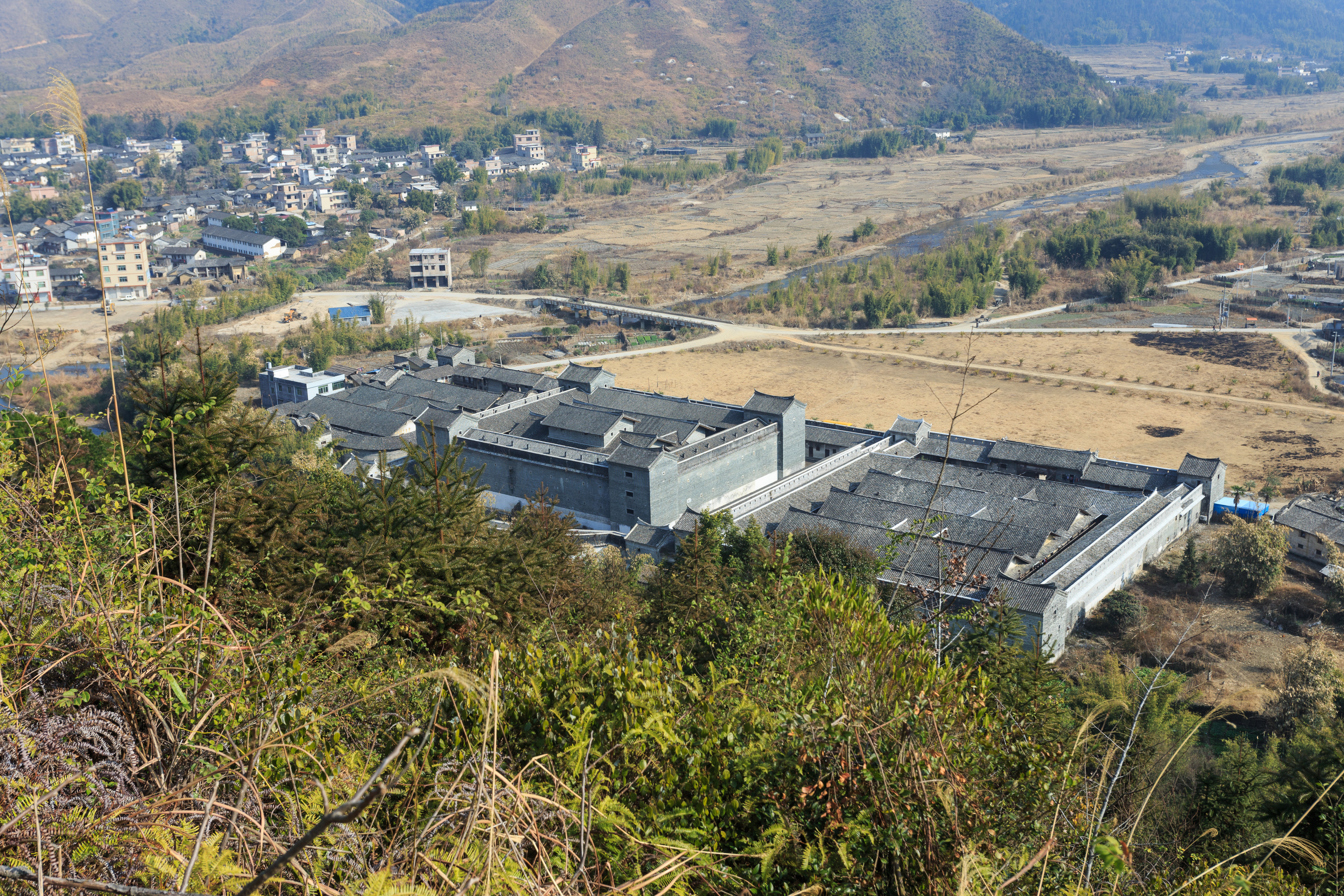 广东省始兴县隘子镇满堂围—— 俯瞰